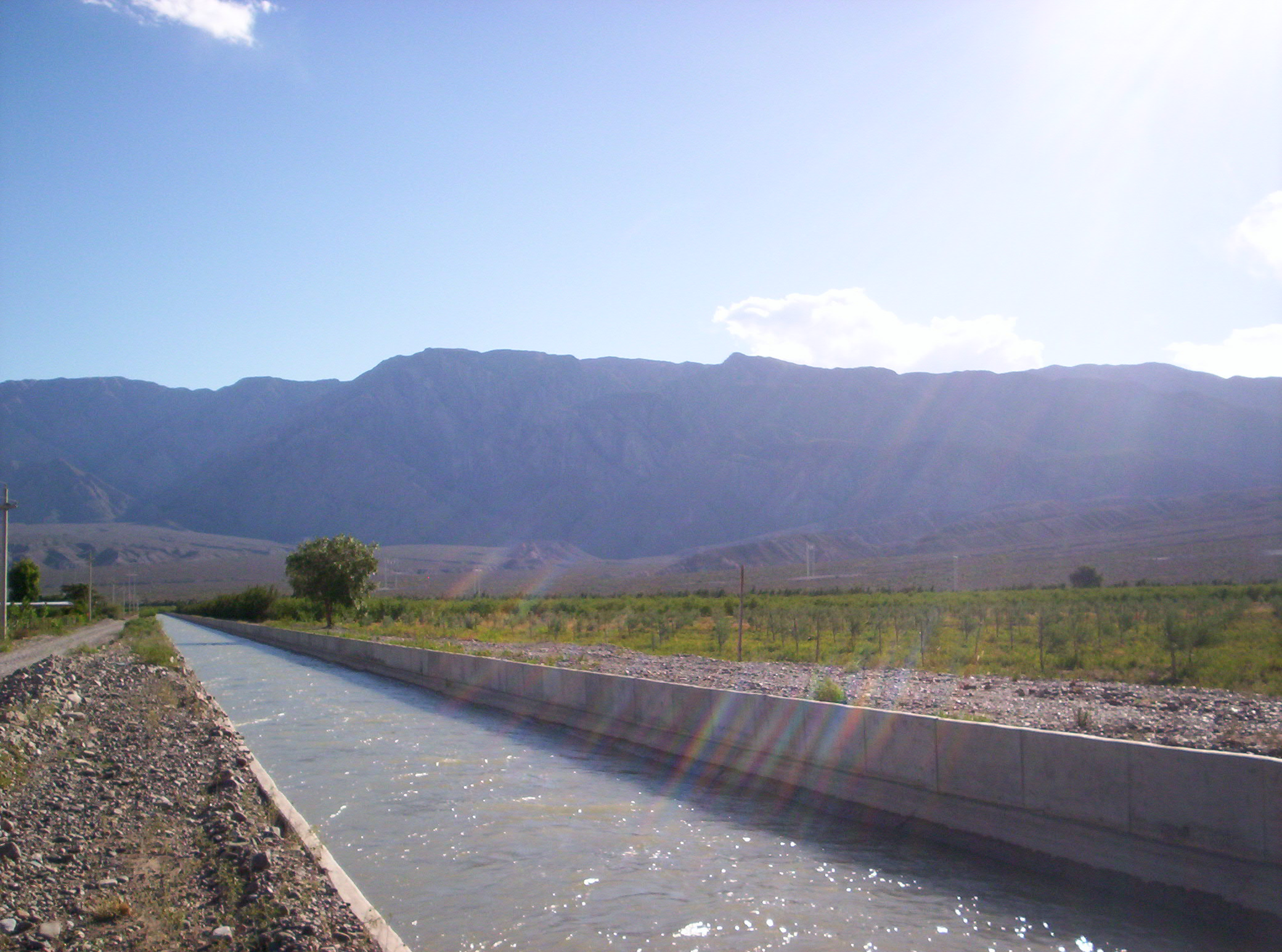 Canal de regadio, en el departamento Pocito, San Juan, Argentina